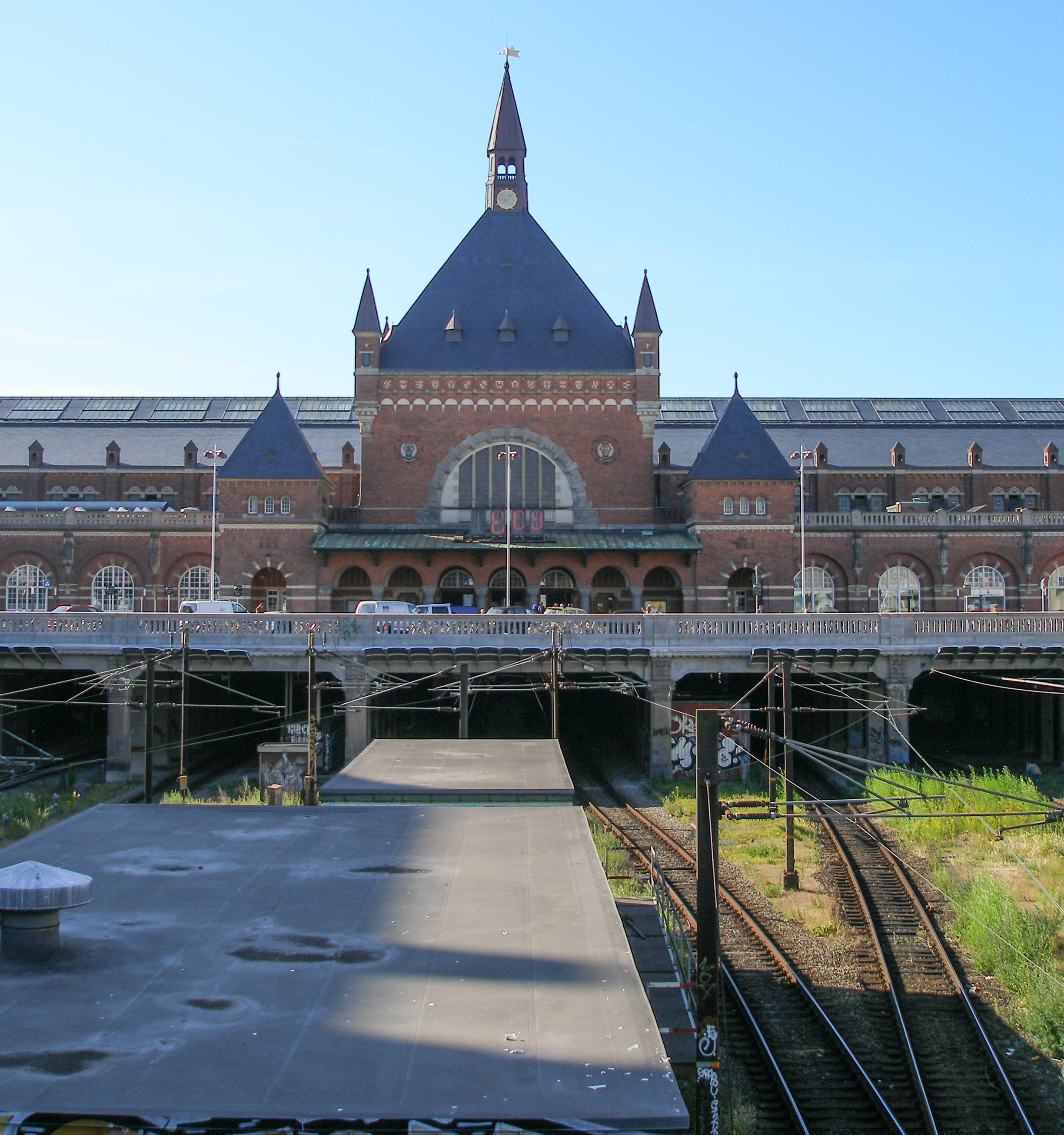 Københavns Hovedbanegård set fra Vesterbrogade